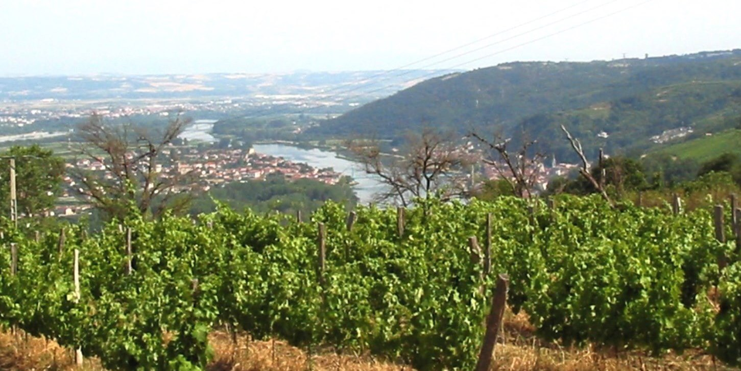 Charnas détail